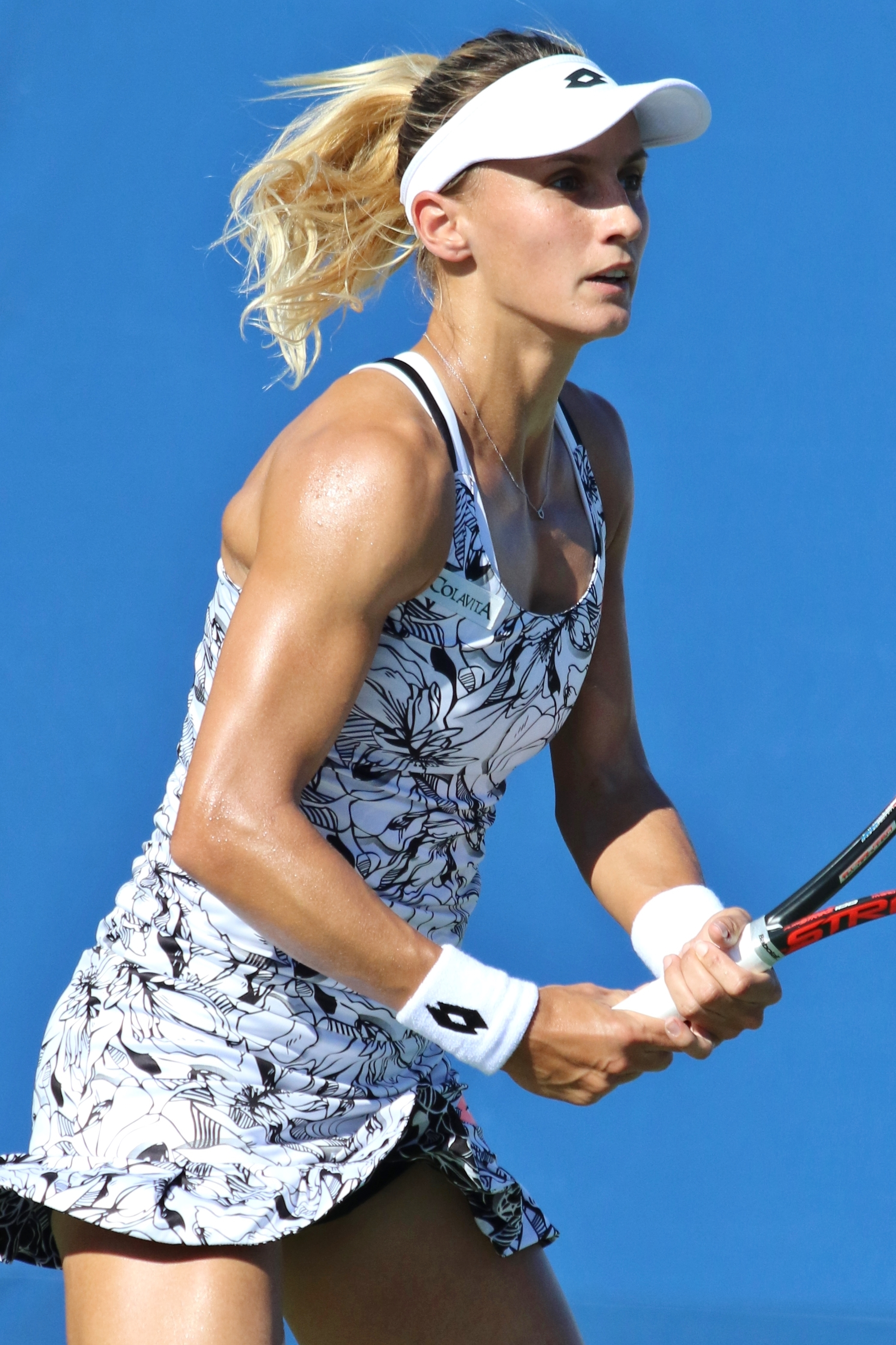 Tsurenko US16 (13)